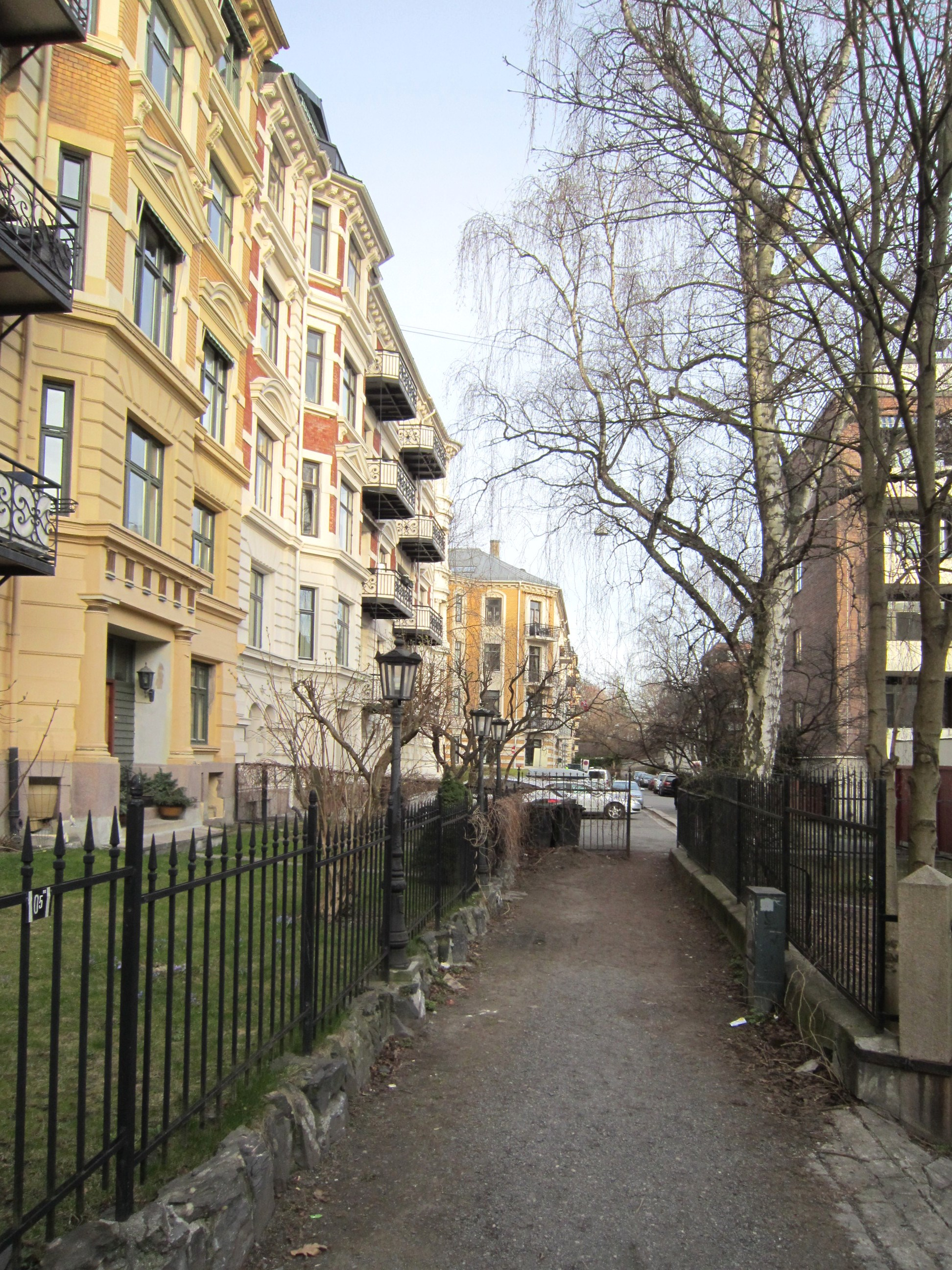 Svoldergata er stengt for biltrafikk mellom Gabels gate og Bjørn Farmanns gate.